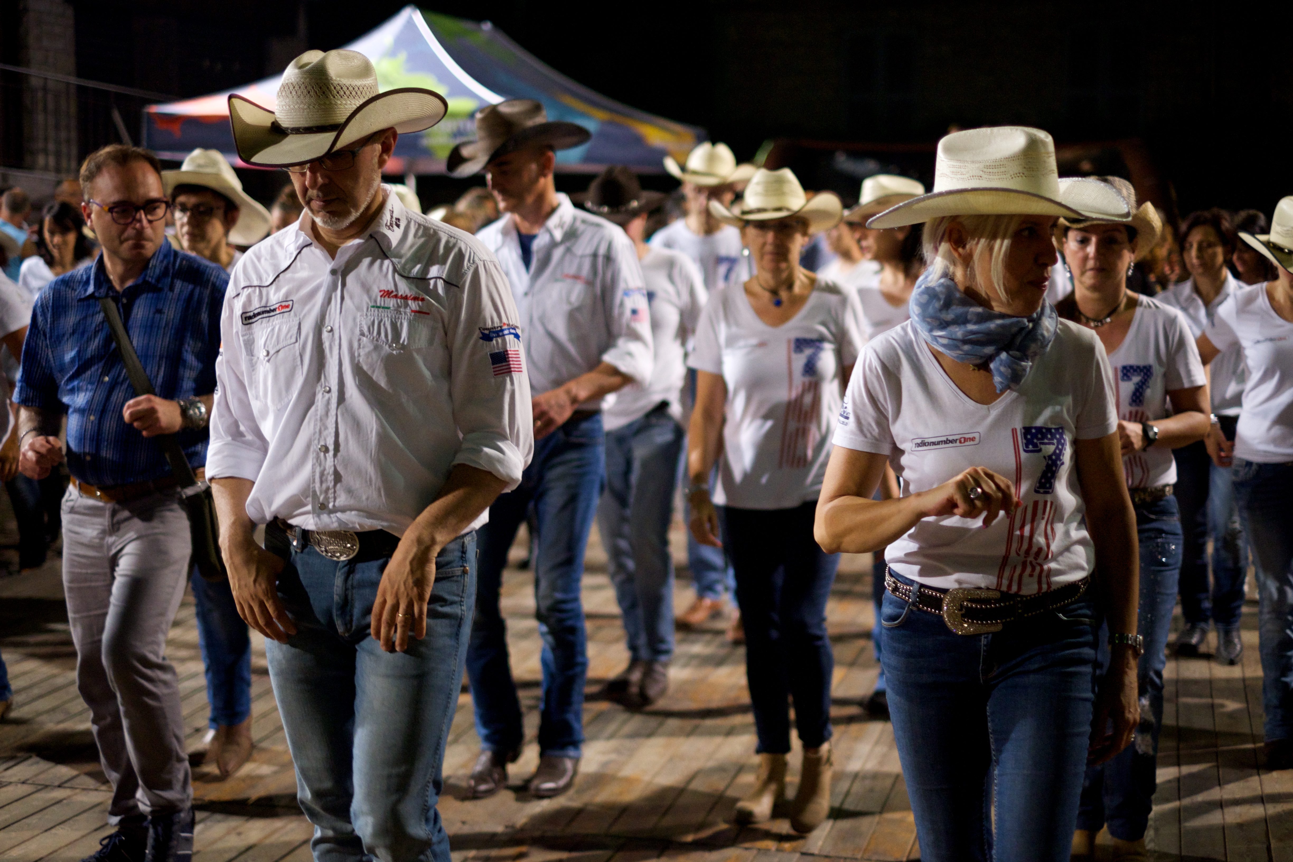 Wikimania 2016 Esino Lario